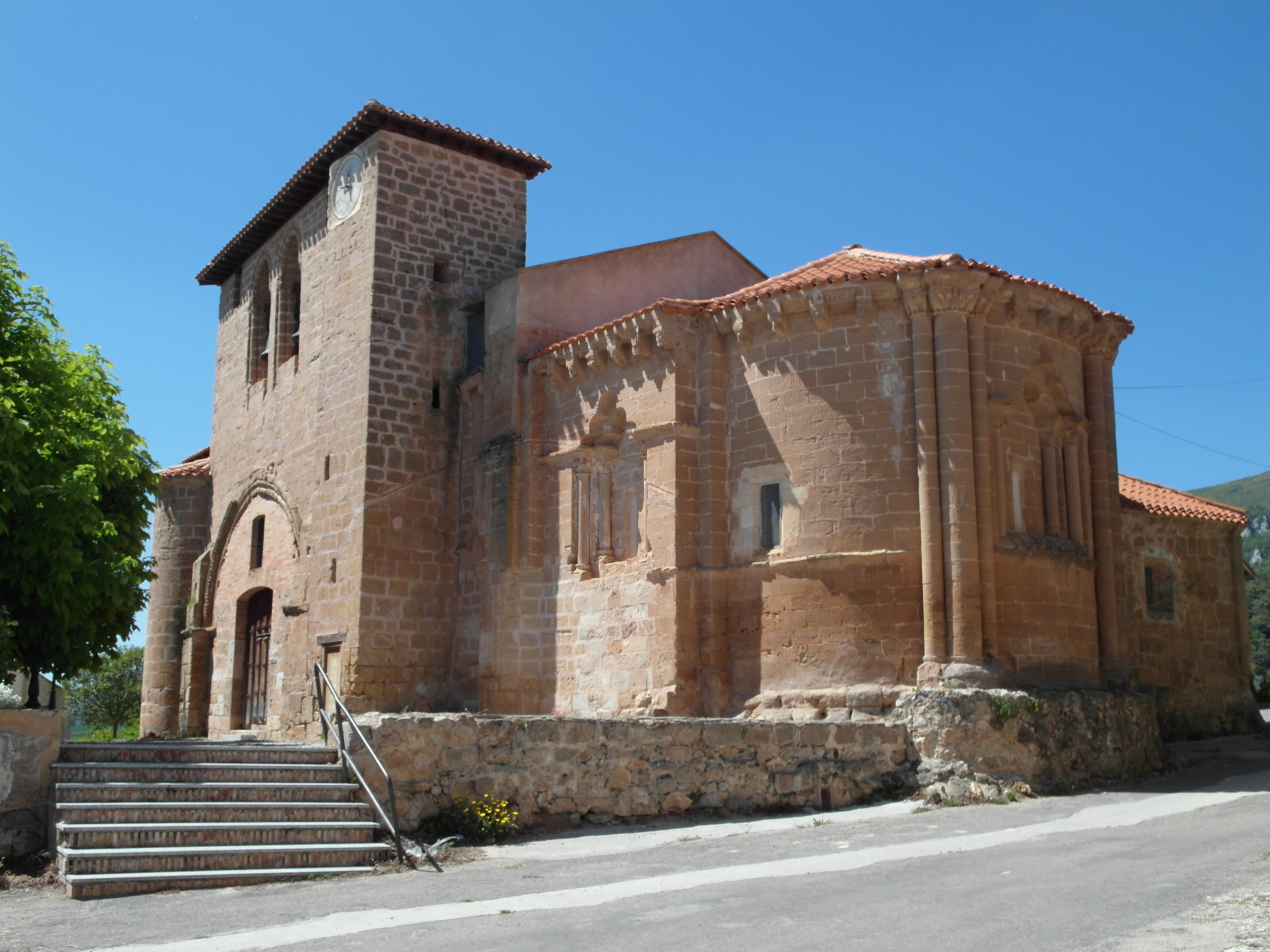 Navas de Bureba